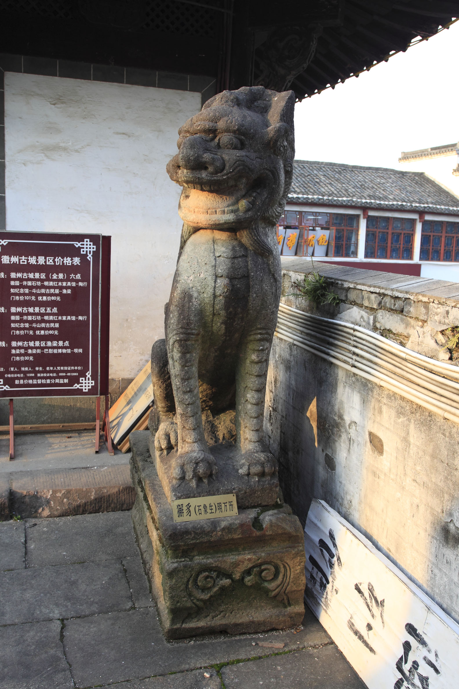 獬豸石雕，藏于歙县东谯楼。